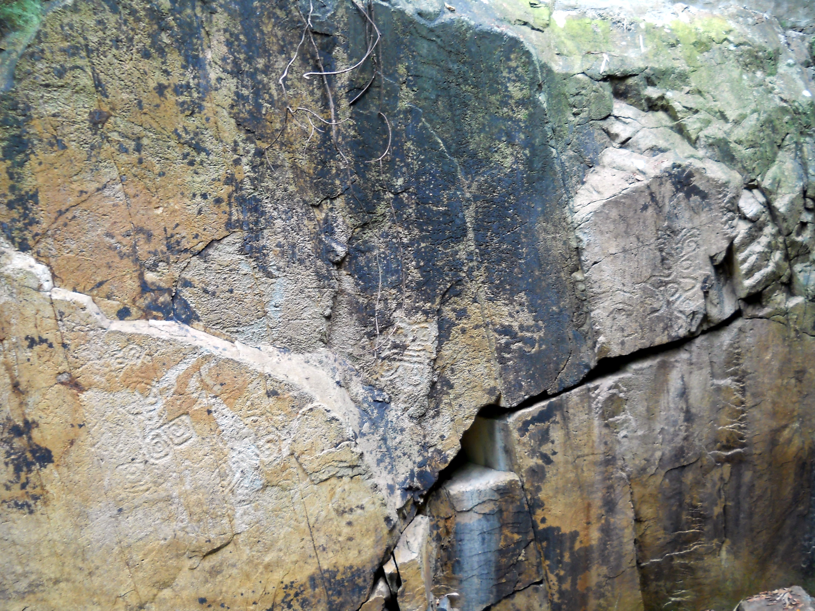 中文（香港）: 黃竹坑石刻細部